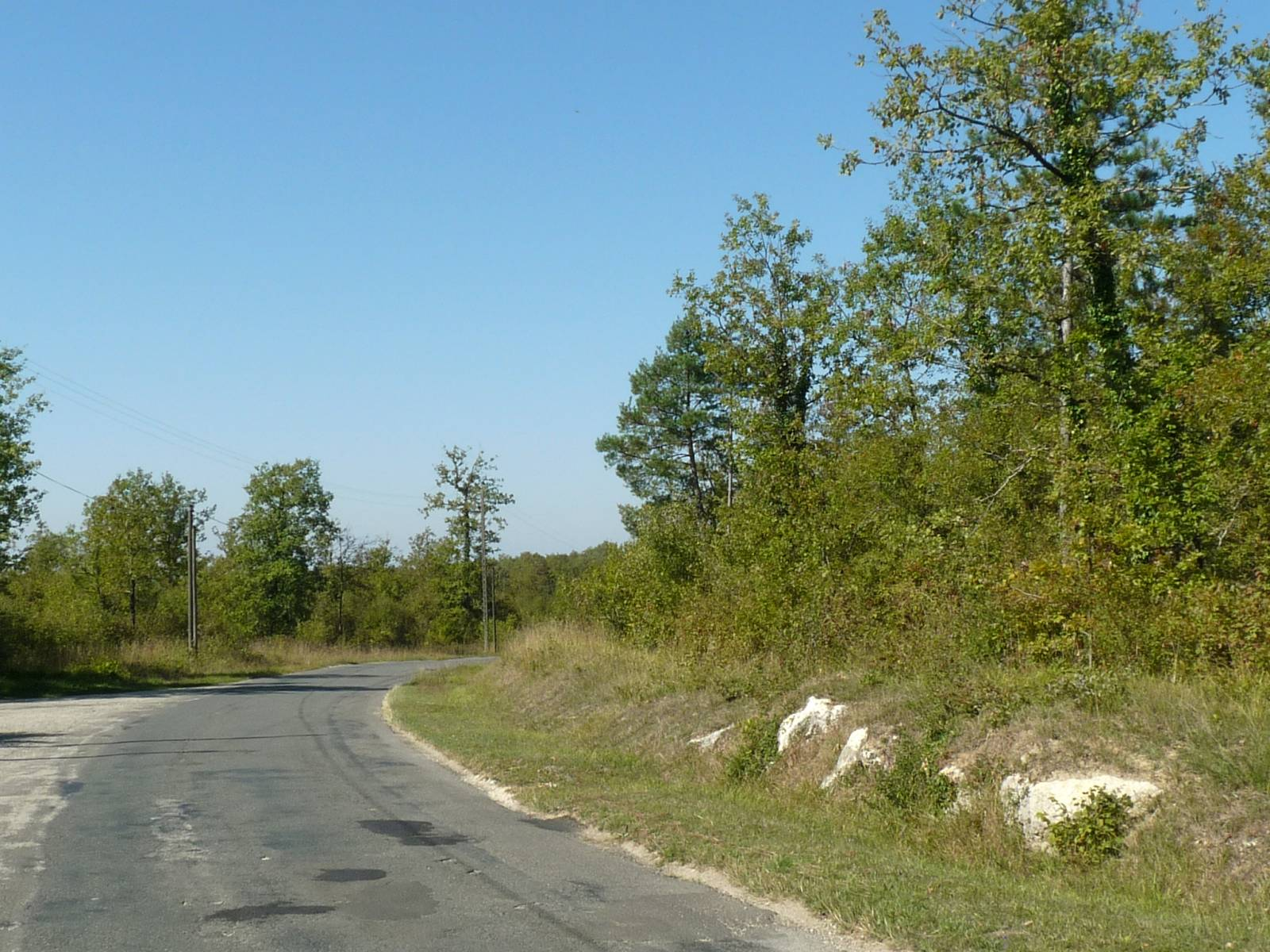 Forêt domaniale de Bois Blanc, Touvre (16), France